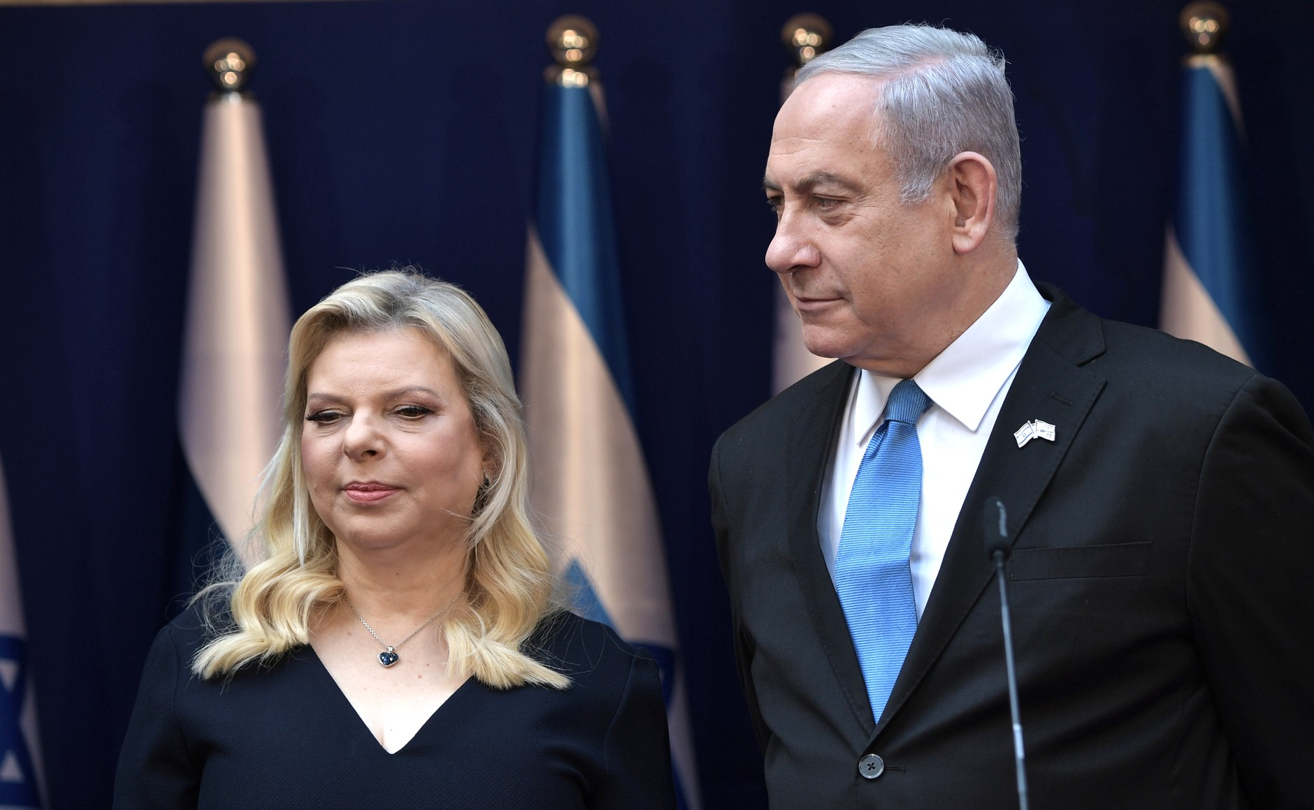 Премьер-министр Израиля Биньямин Нетаньяху и его супруга Сара Нетаньяху.